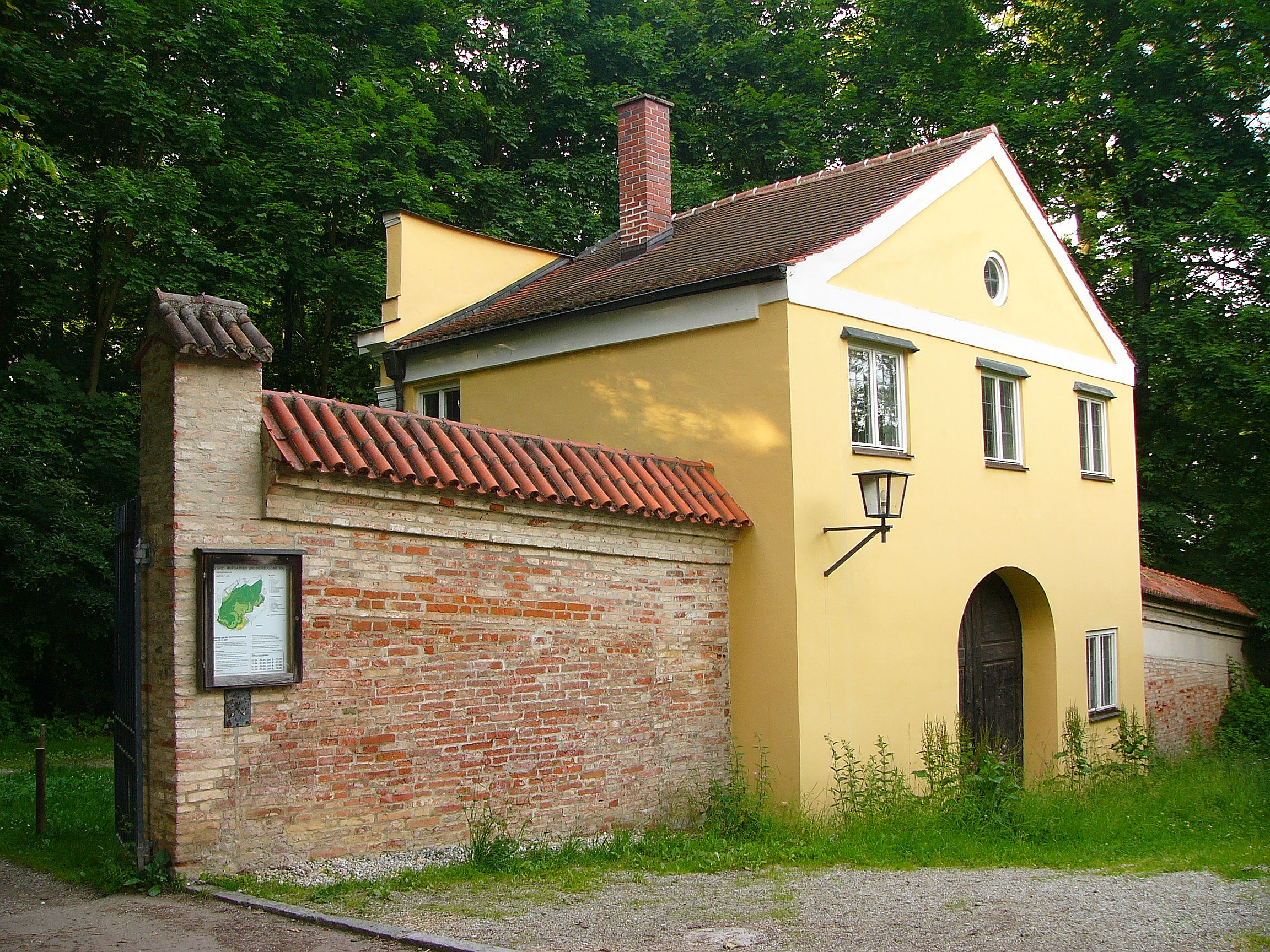 Torbau; zweigeschossiger Putzbau mit Satteldach und klassizistischem Einfahrtstor, erbaut 1784. This is a photograph of an architectural monument.